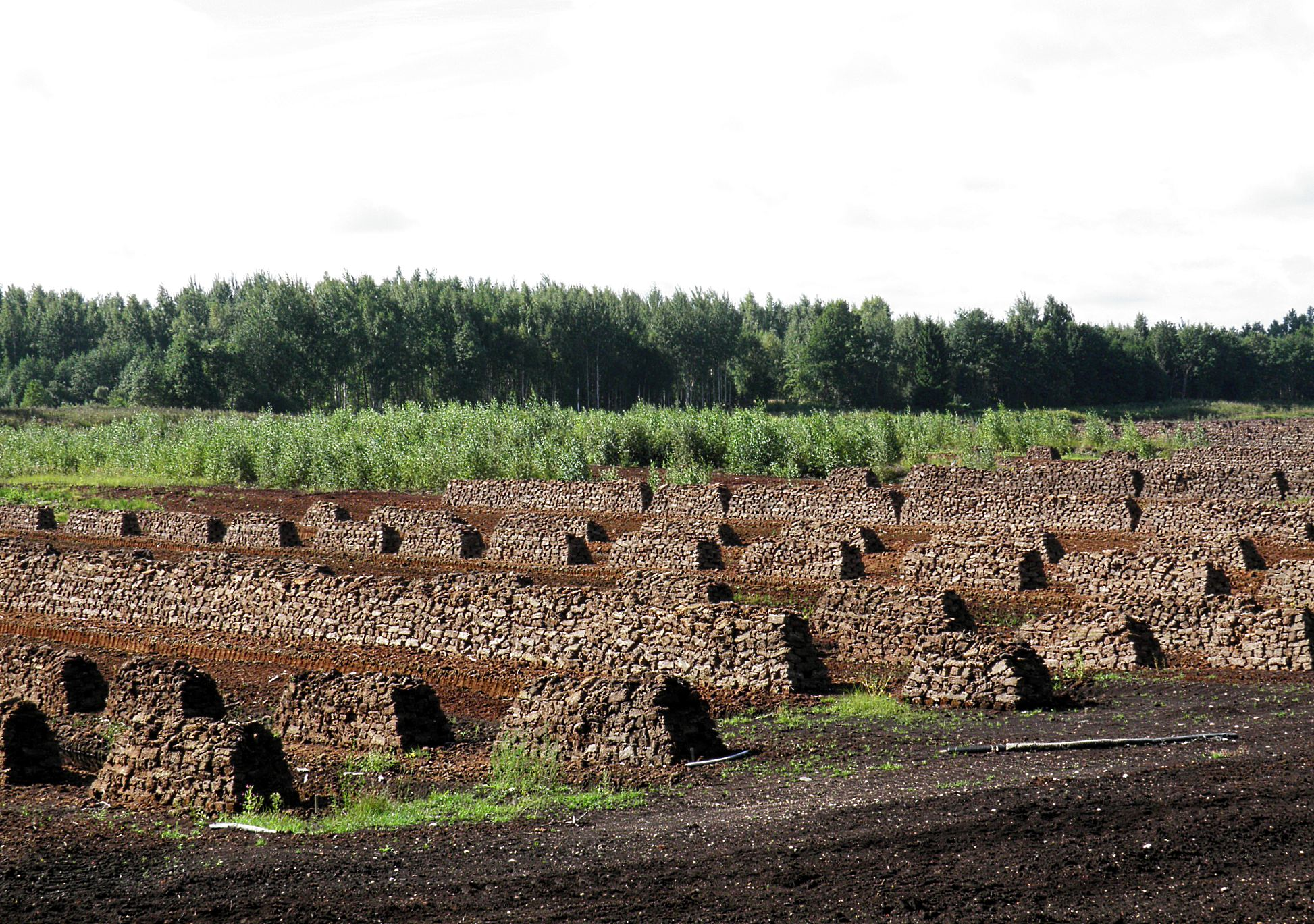 торф | kūdra (2)